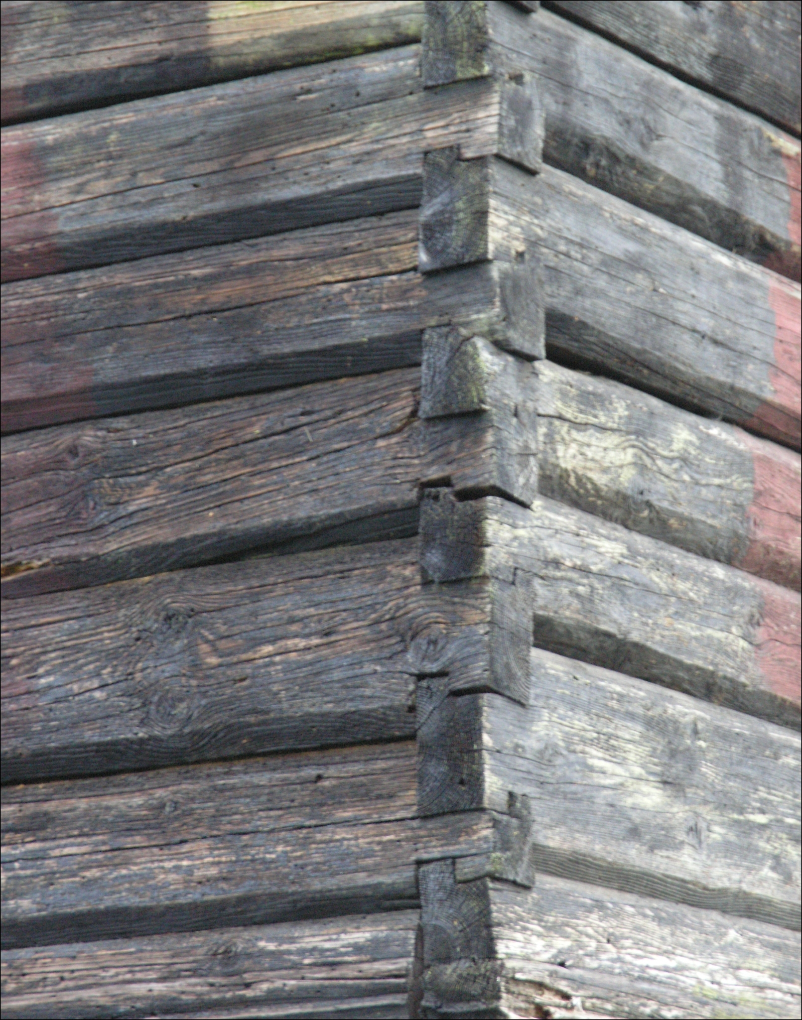 Brtníky - detail trámových spojů roubeného domu